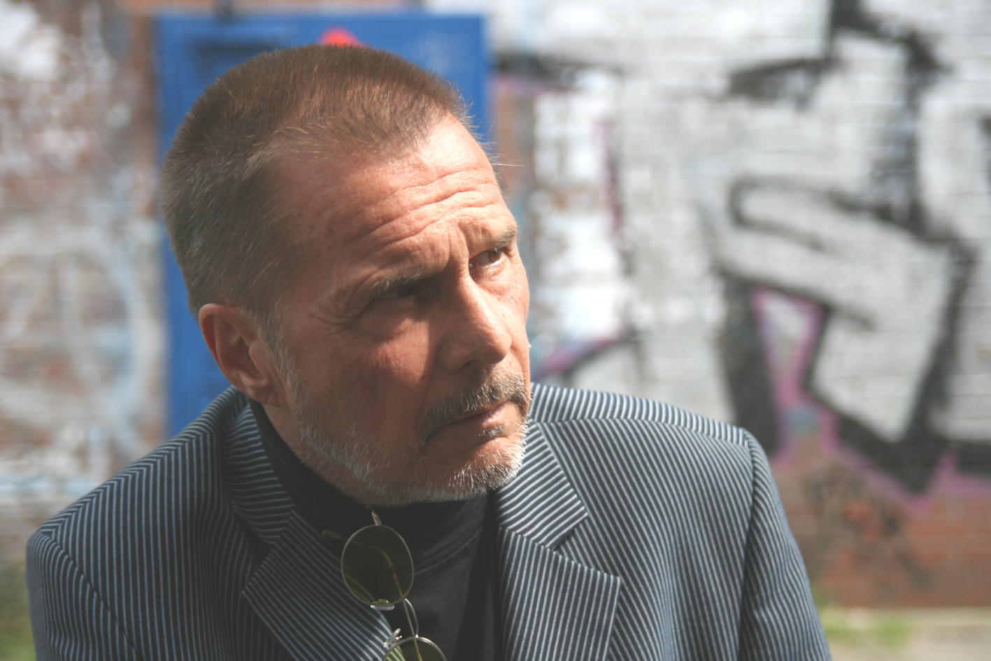 German cartoonist Uli Stein in 2007